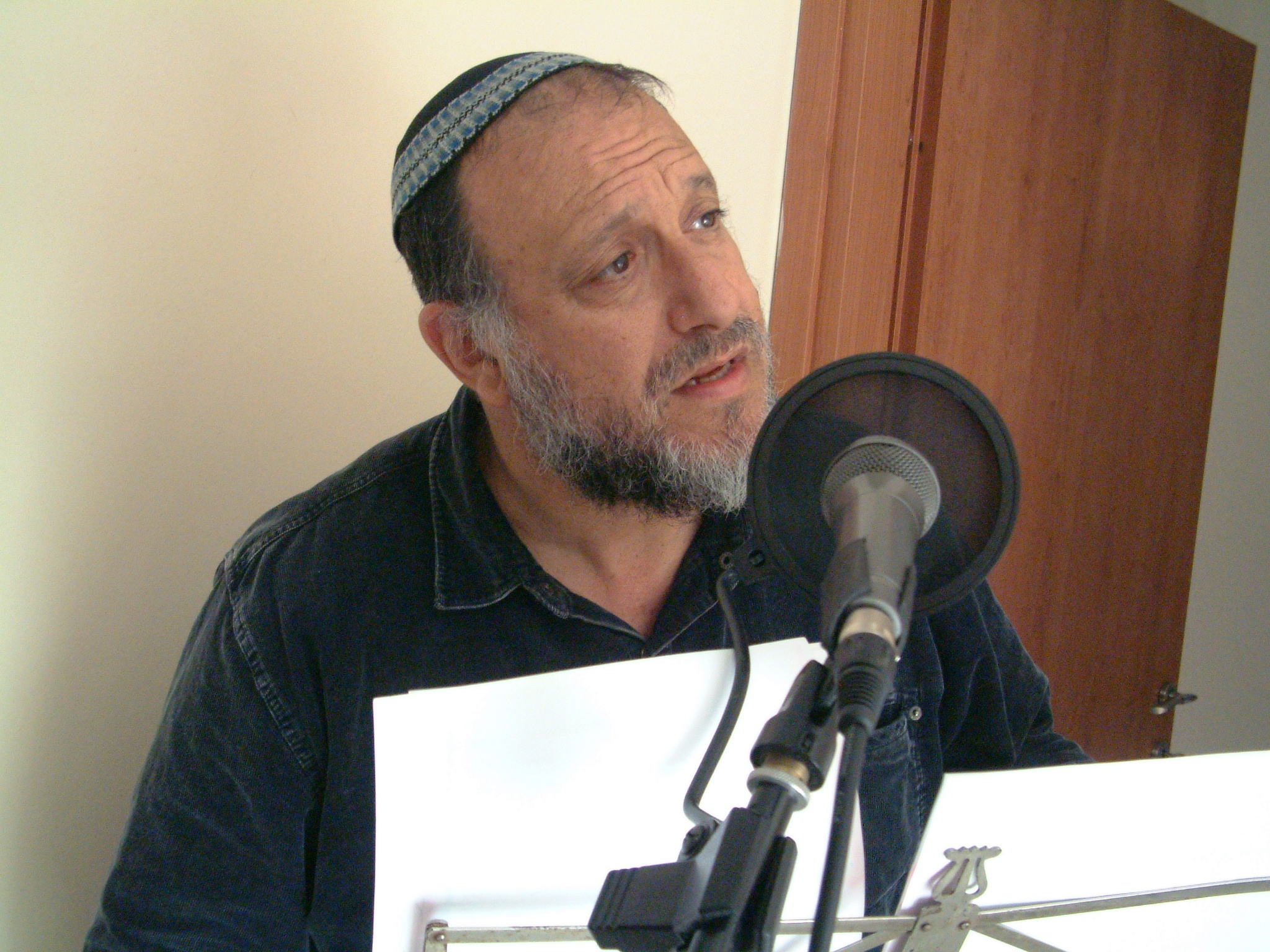 מנחם לוי - תיאטרון אודיו אבות האומה